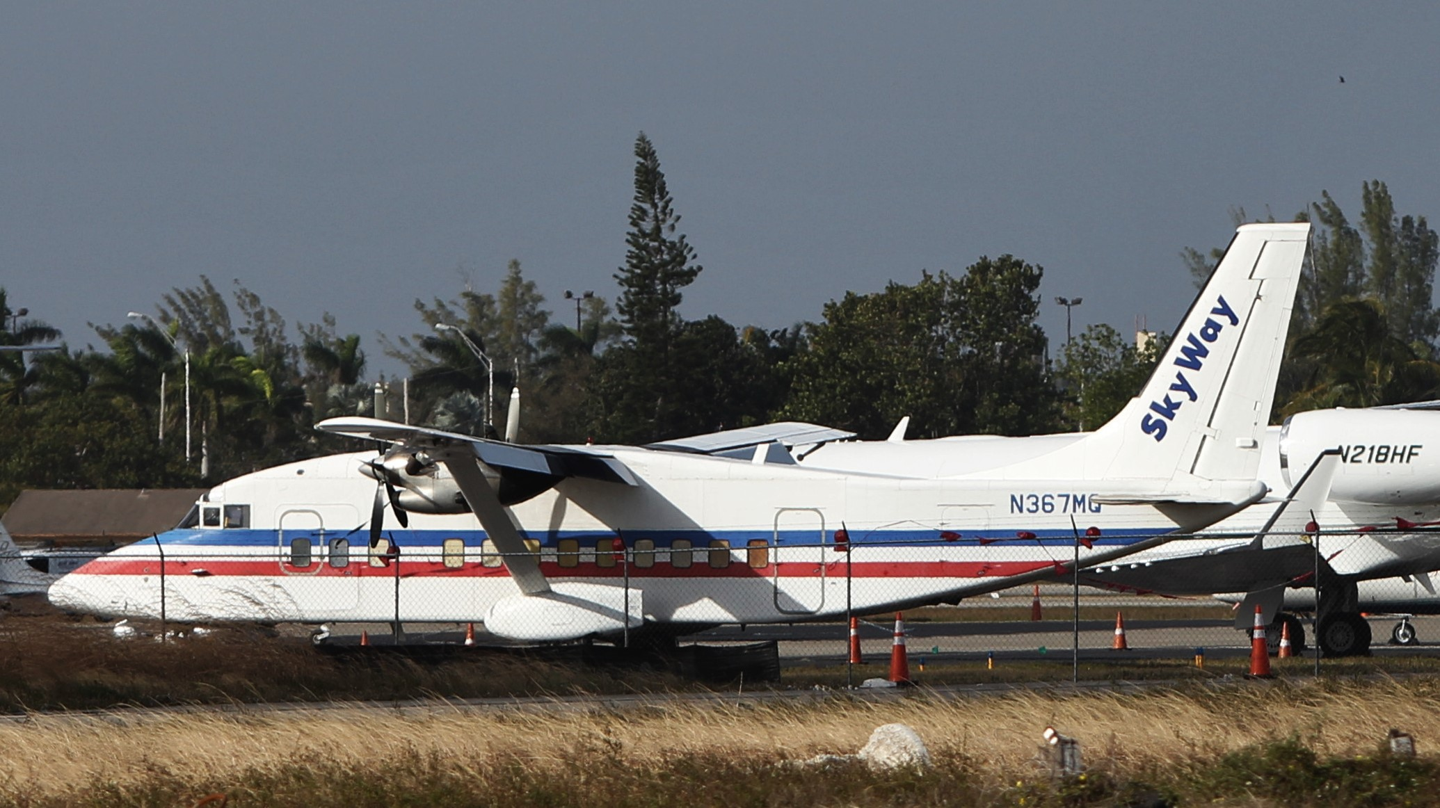 kopf2018 (5)